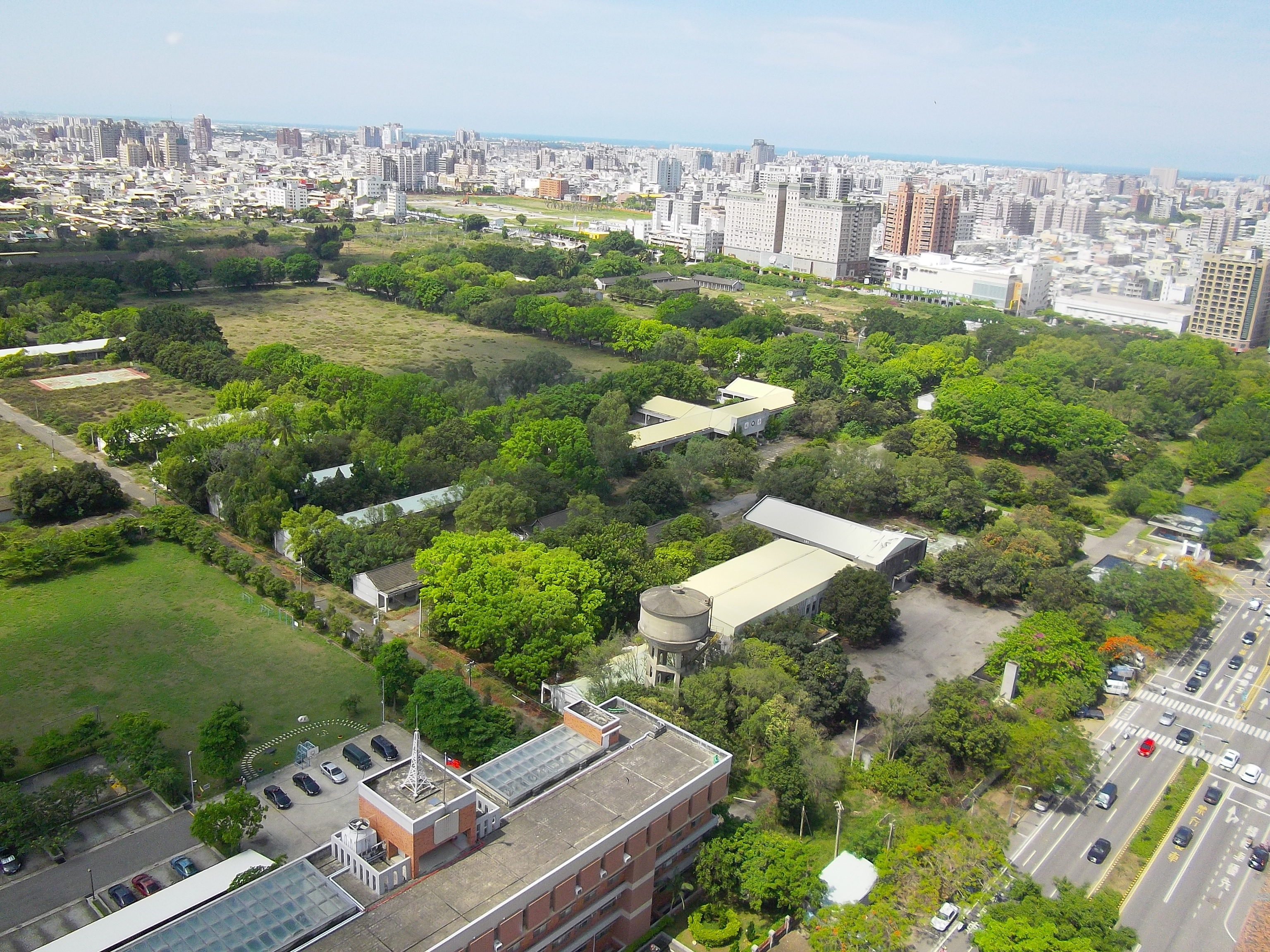 中文（台灣）: 中華民國陸軍平實營區現況。